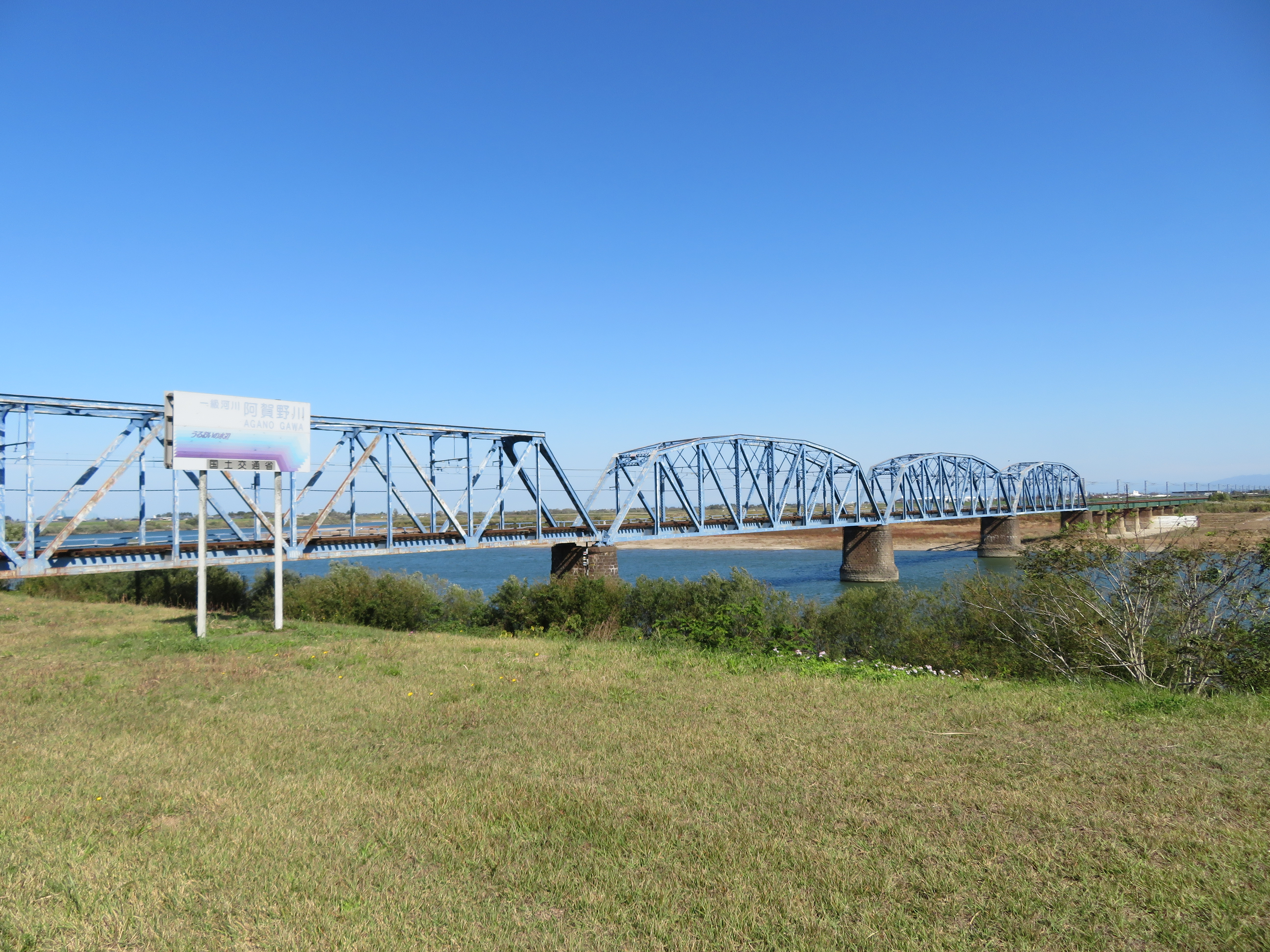 JR羽越本線阿賀野川橋梁（新津駅側から撮影） Canon PowerShot SX720 HS